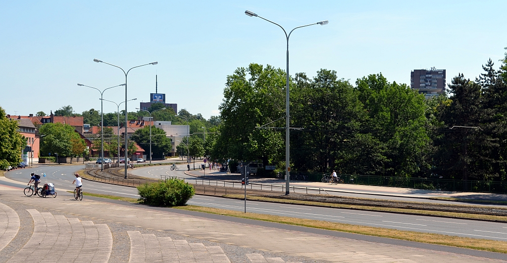 Braunschweig: Ottmer-Brücke von 1959 über die Oker in Braunschweig.